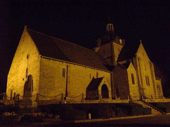 Église Saint-Martin de Tremblay (35)